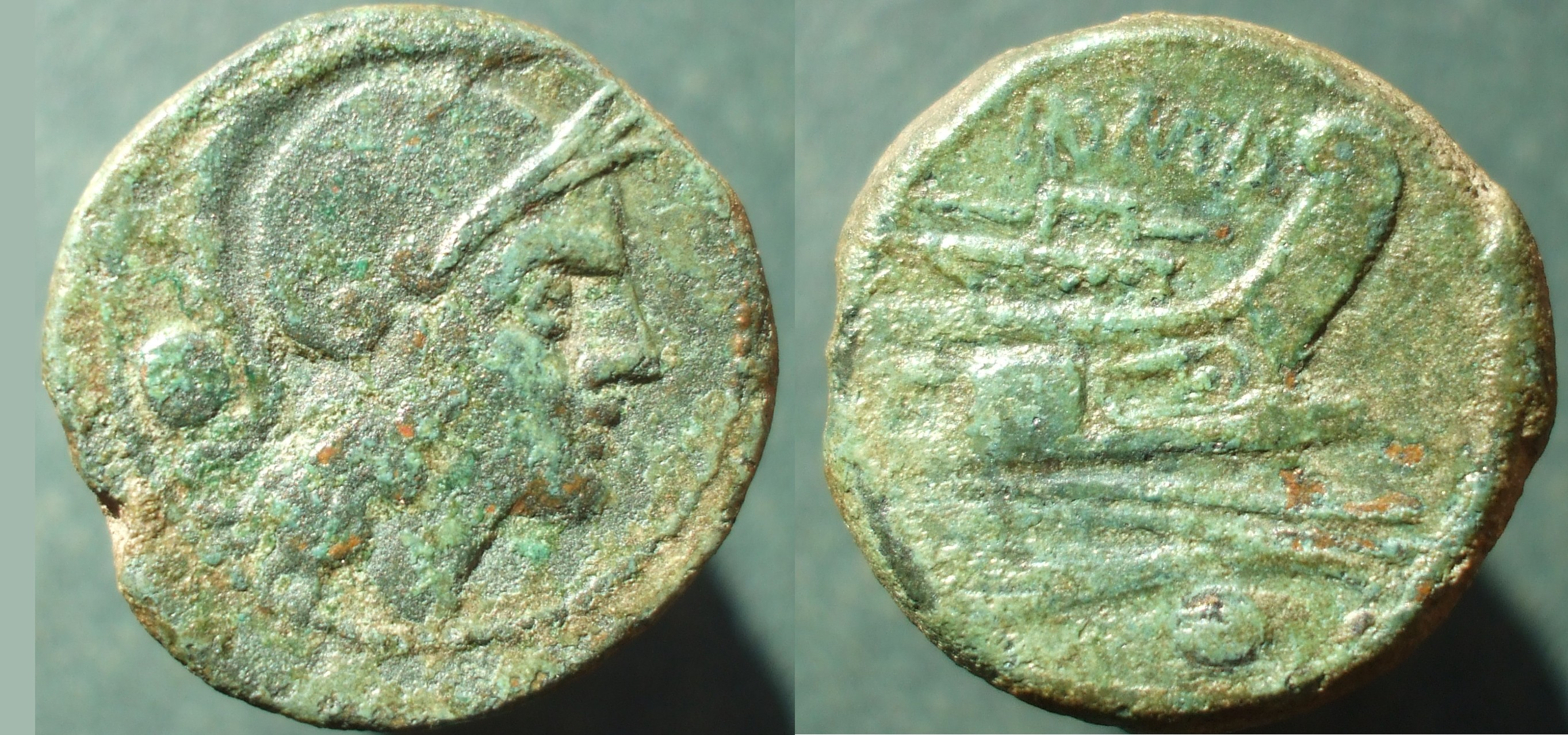 Monnaie romaine République Once Roma Proue Globule